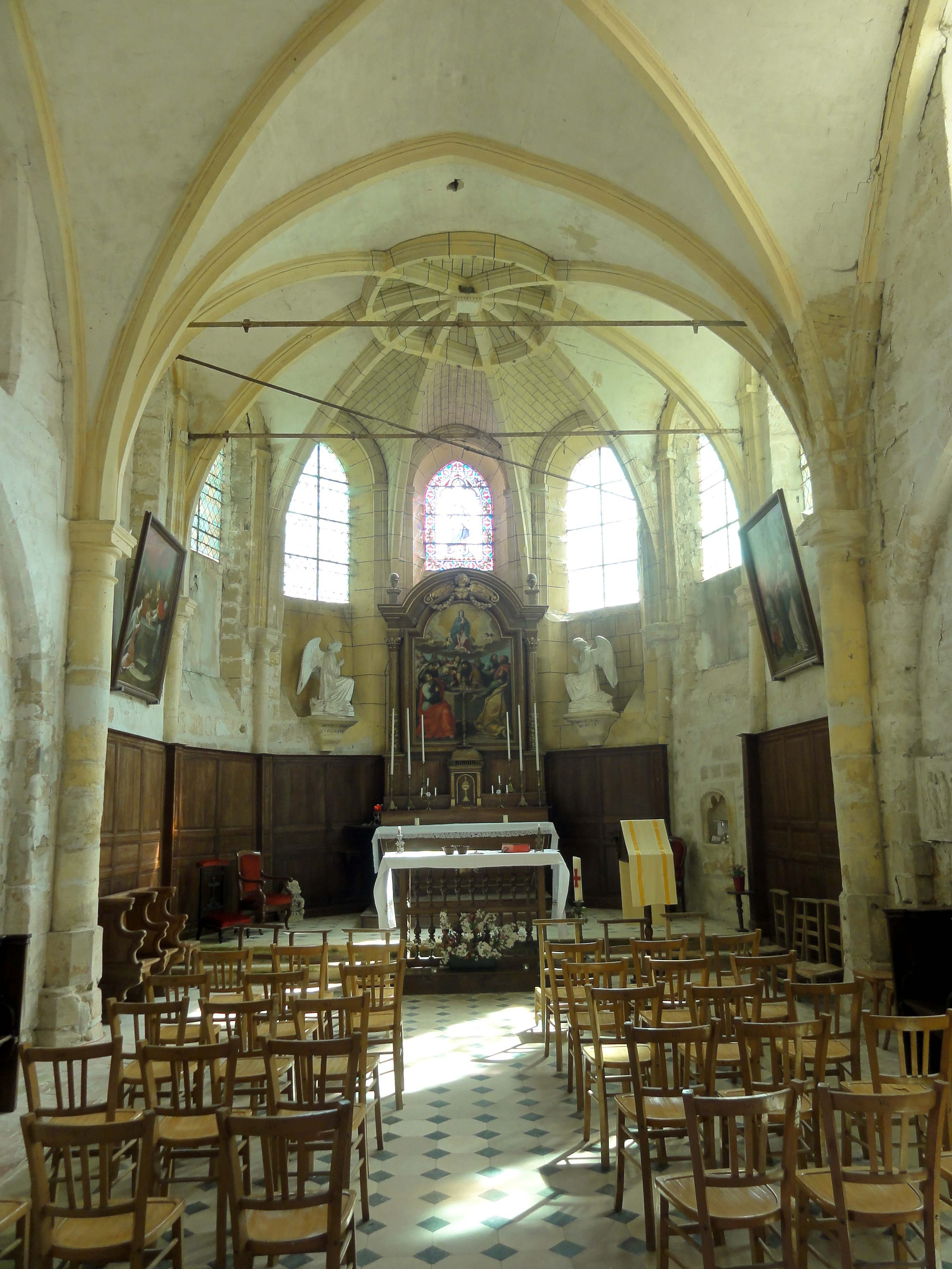 Intérieur de l'église - voir titre.